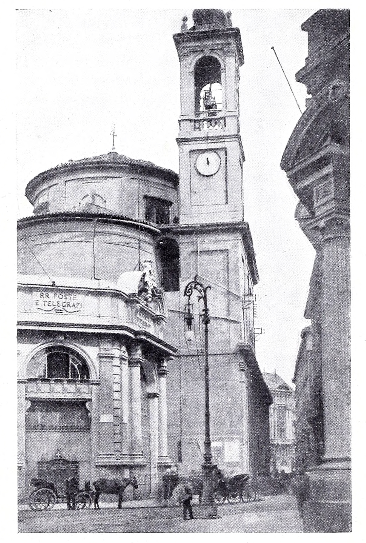 Campanile e abside della chiesa di Sant Maria Segreta prima della demolizione avvenuta nel 1911